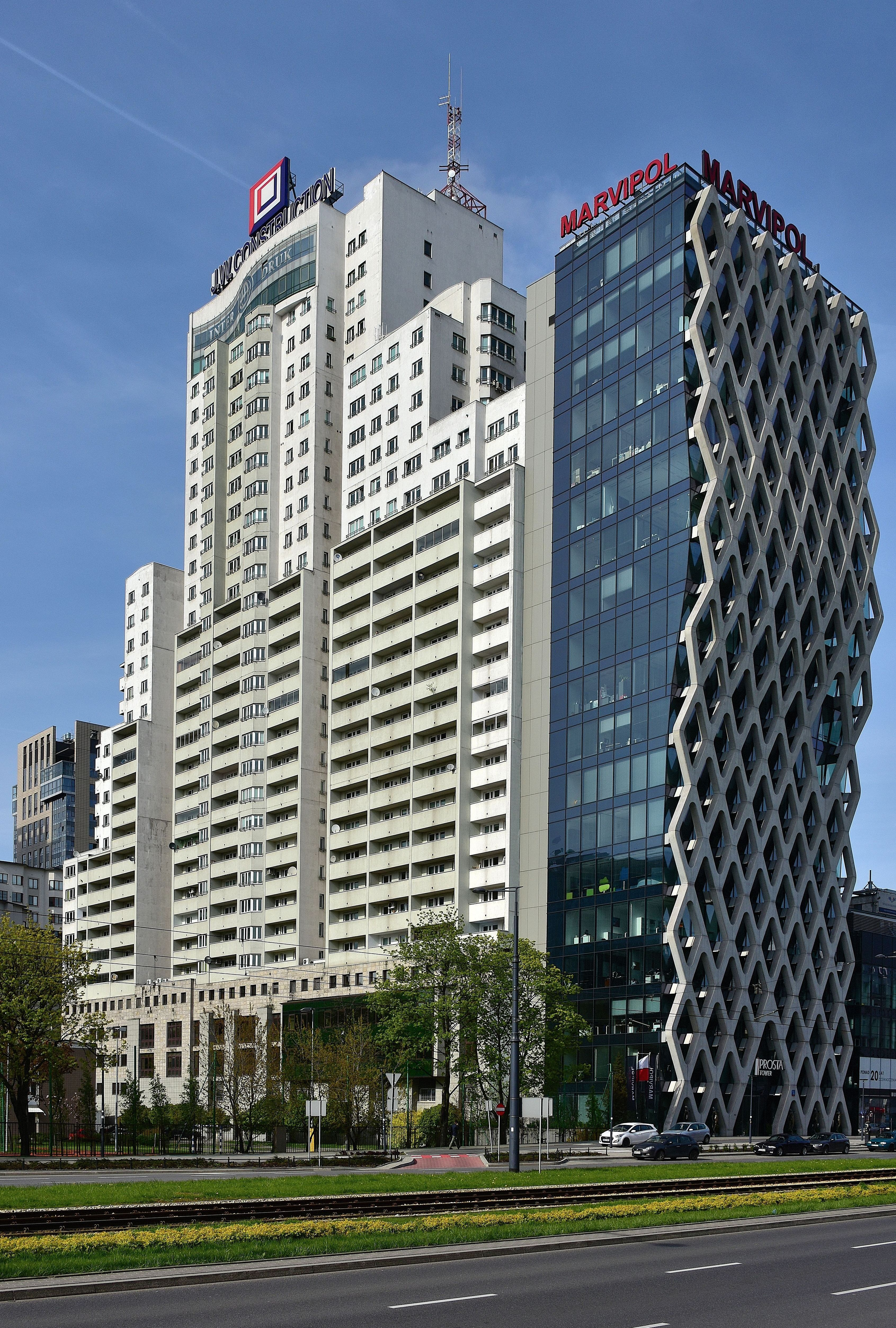 Budynki Łucka City i Prosta Tower w Warszawie